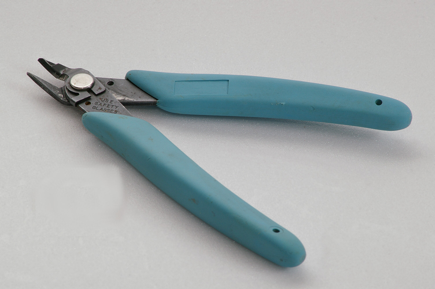 Handlicher Seitenschneider fuer die Platinenbestueckung. Griffe federnd, Klemmfeder an der Schneide haelt abgeschnittene Bauteildraehte fest.